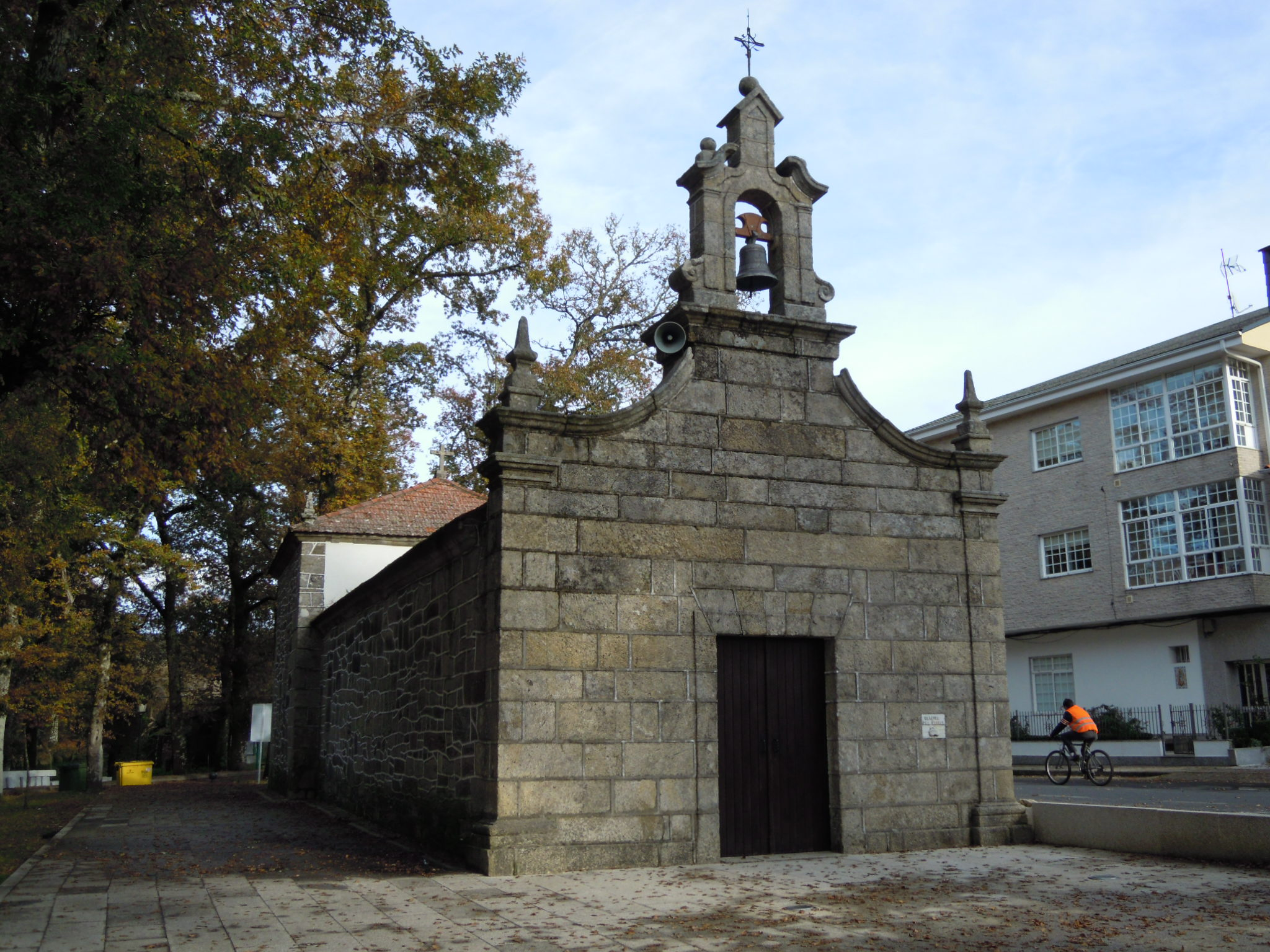 Capela da Virxe do Carme en Doade (Xirazga, Beariz).